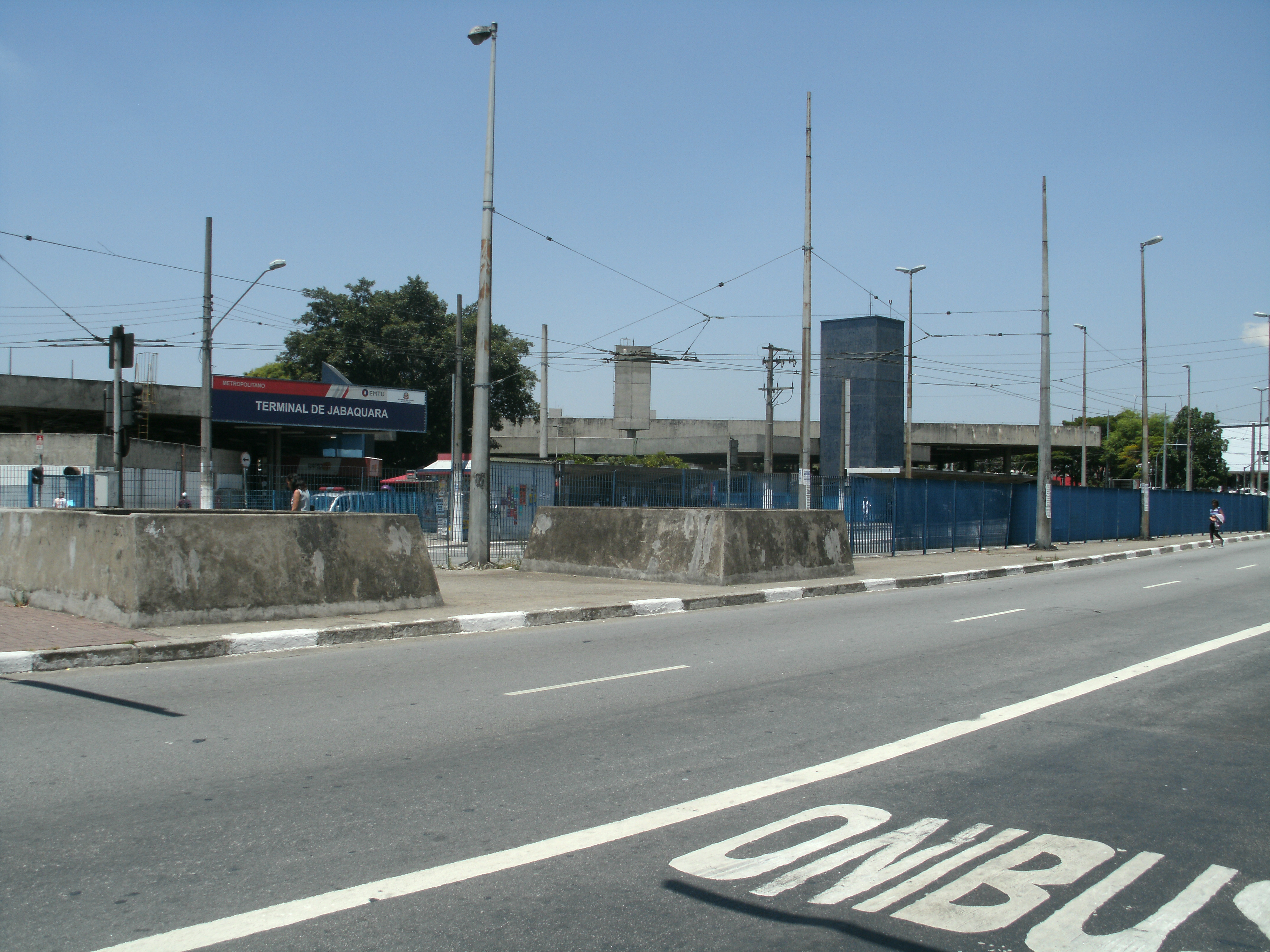 Terminal de Onibus de Jabaquara